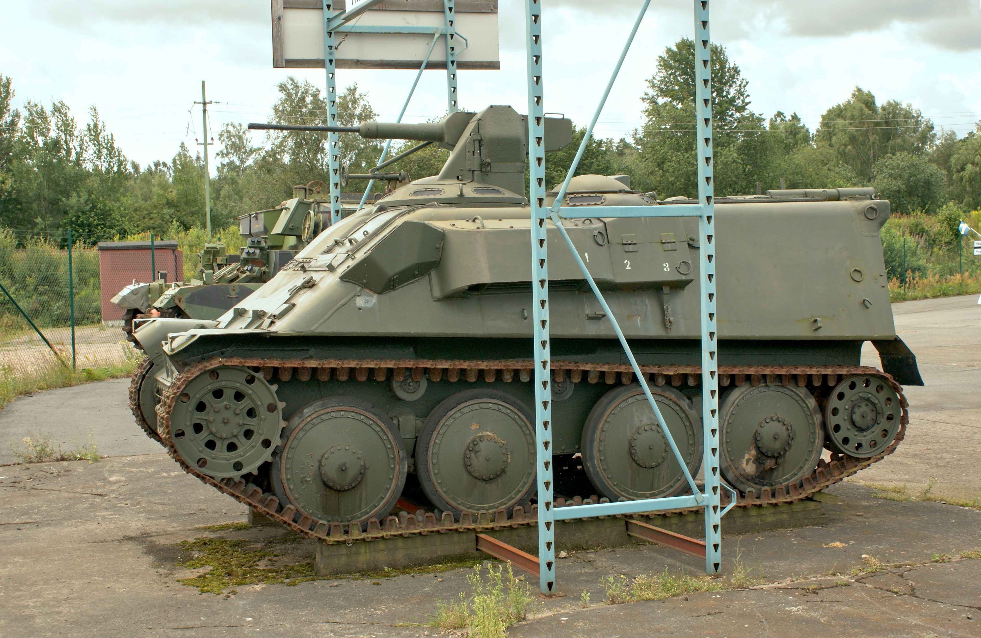 Pansarbandvagn 301 in Hässleholms Museum am 31.Juli 2009